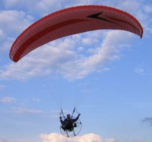 Motorschirm im Flug; Pilot: Hermann Achenbach, Wallau; Gleitschirm: Swing-Arcus; Motor: Fresh-Breeze Simonini